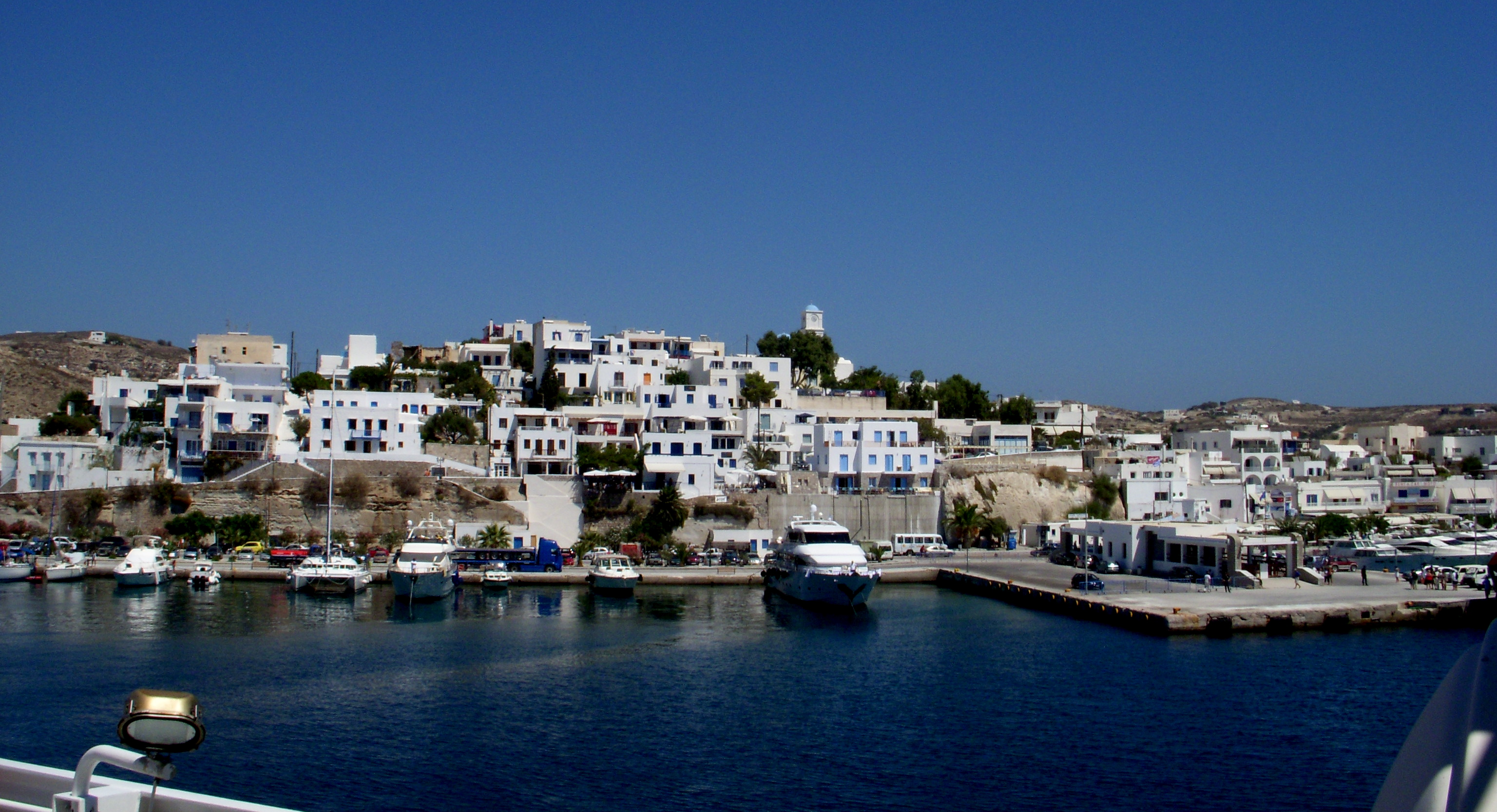 Adamas, Milos, Greece